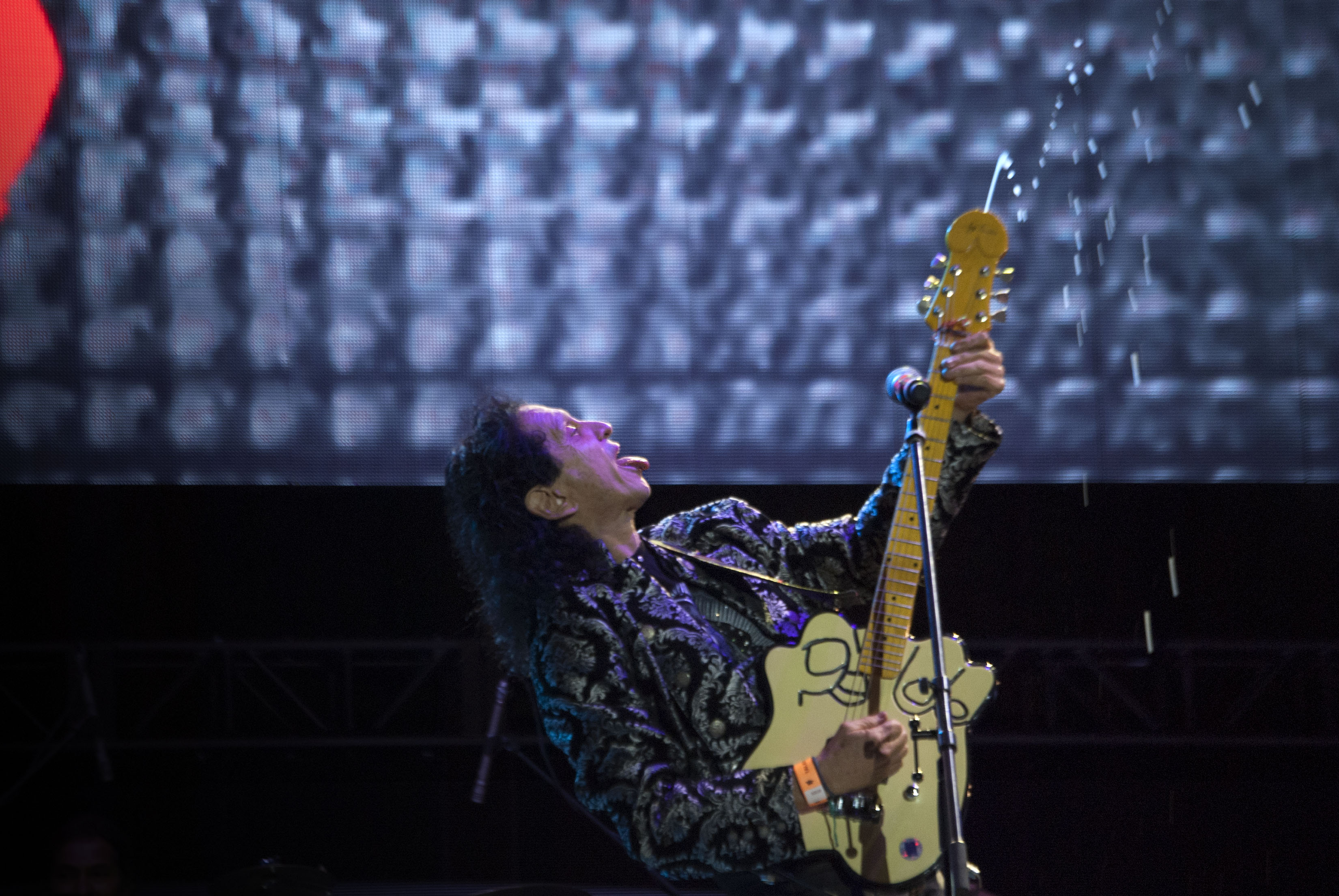 Sábado 12 de noviembre de 2017. Como parte de las actividades de la Semana de las Juventudes del 2017, este sábado 12 de noviembre se desarrolló un segundo concierto masivo en la plancha del Zócalo capitalino. Las bandas que se presentaron en esta ocasión fueron: Marcelo Viejo, Charlie Rodd, Ely Guerra, Dorian, Chetes, La Gusana Ciega, División Minúscula, El Tri y Fatboy Slim. Fotografía: Carlos Luna / Secretaría de Cultura CDMX